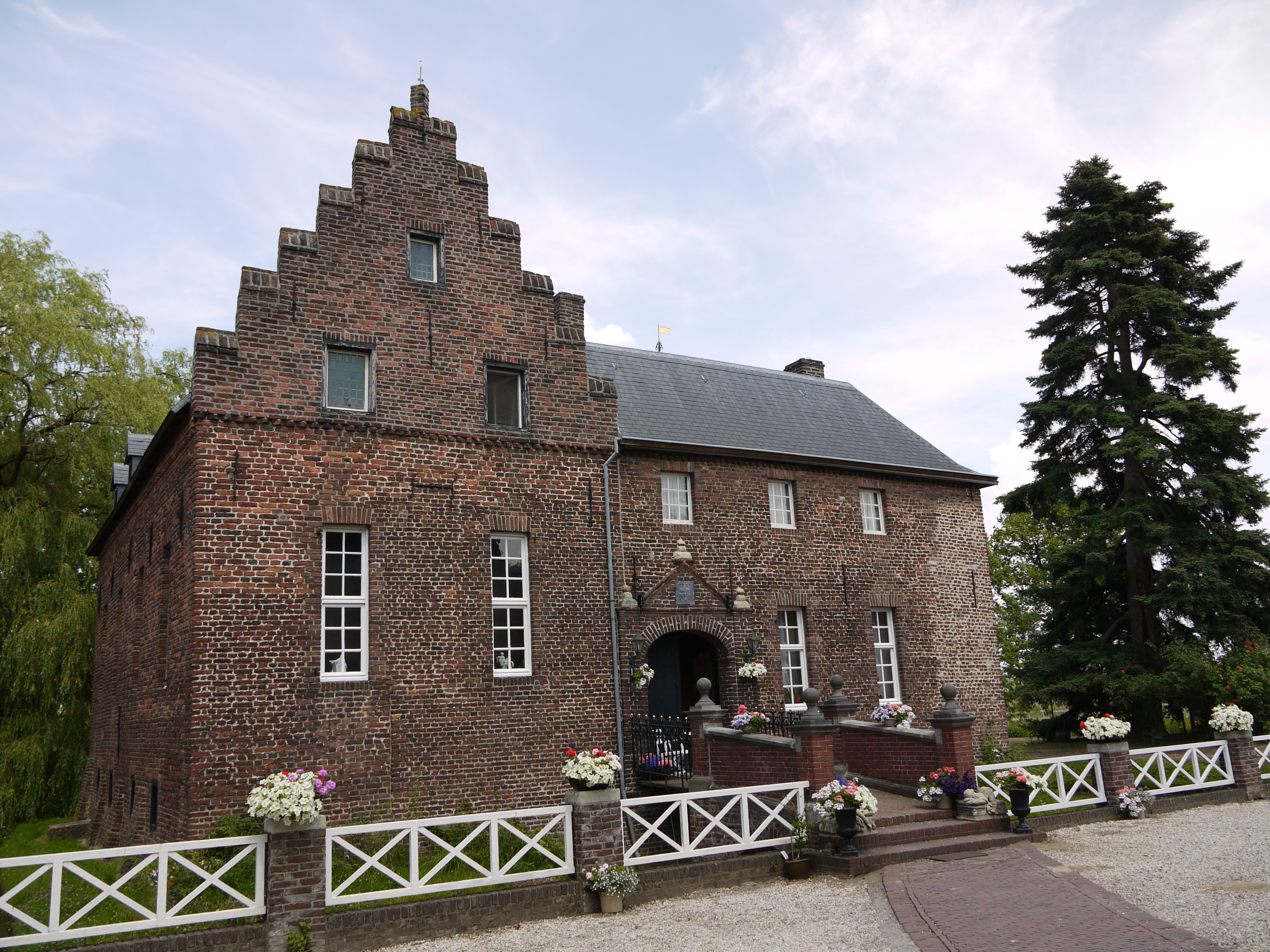 De Borggraaf, a castle in Lottum, Horst aan de Maas.